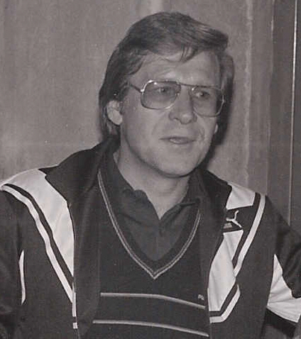 Diethelm Ferner als Trainer des FC Schalke 04, 1985